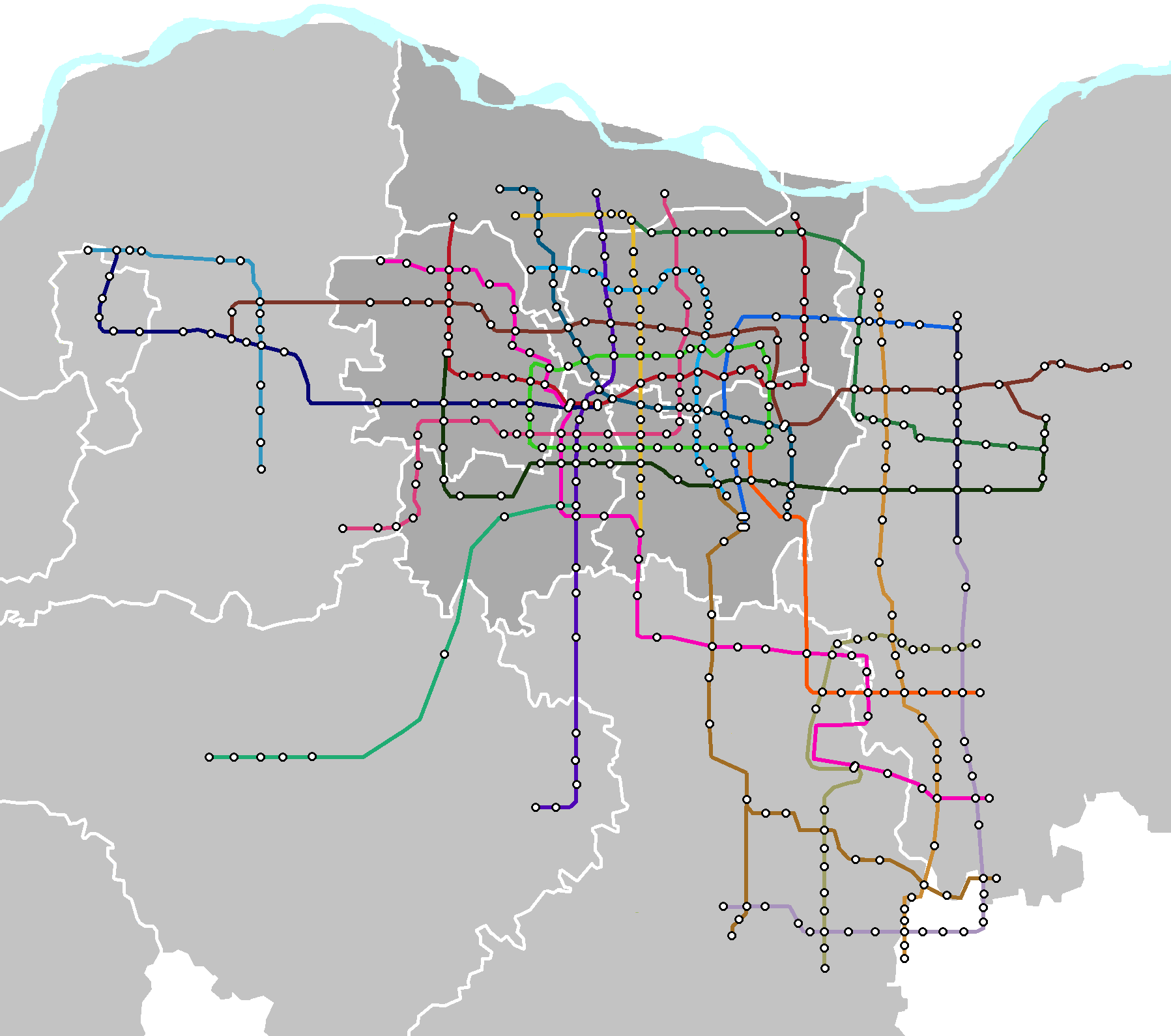 نقشه جغرافیایی خطوط مترو شهر ژنگژو استان هنان برنامه ساخت بلند مدت تا سال 2050